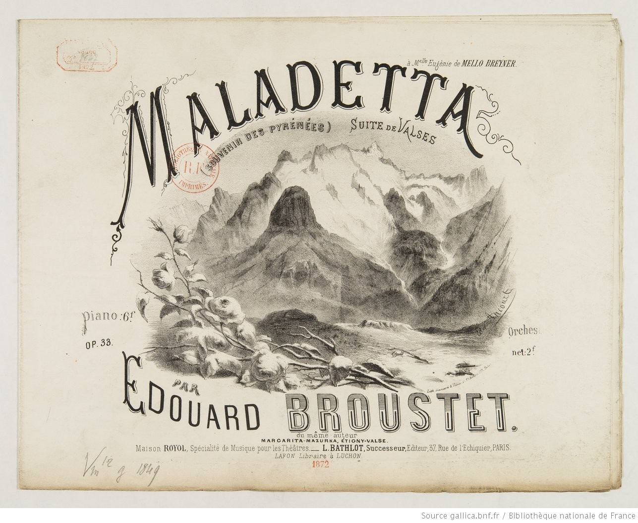 Annonce L. Bathlot (Paris) 1872 : Maladetta ! Souvenir des Pyrénées. Suite de valses pour piano par Edouard Broustet